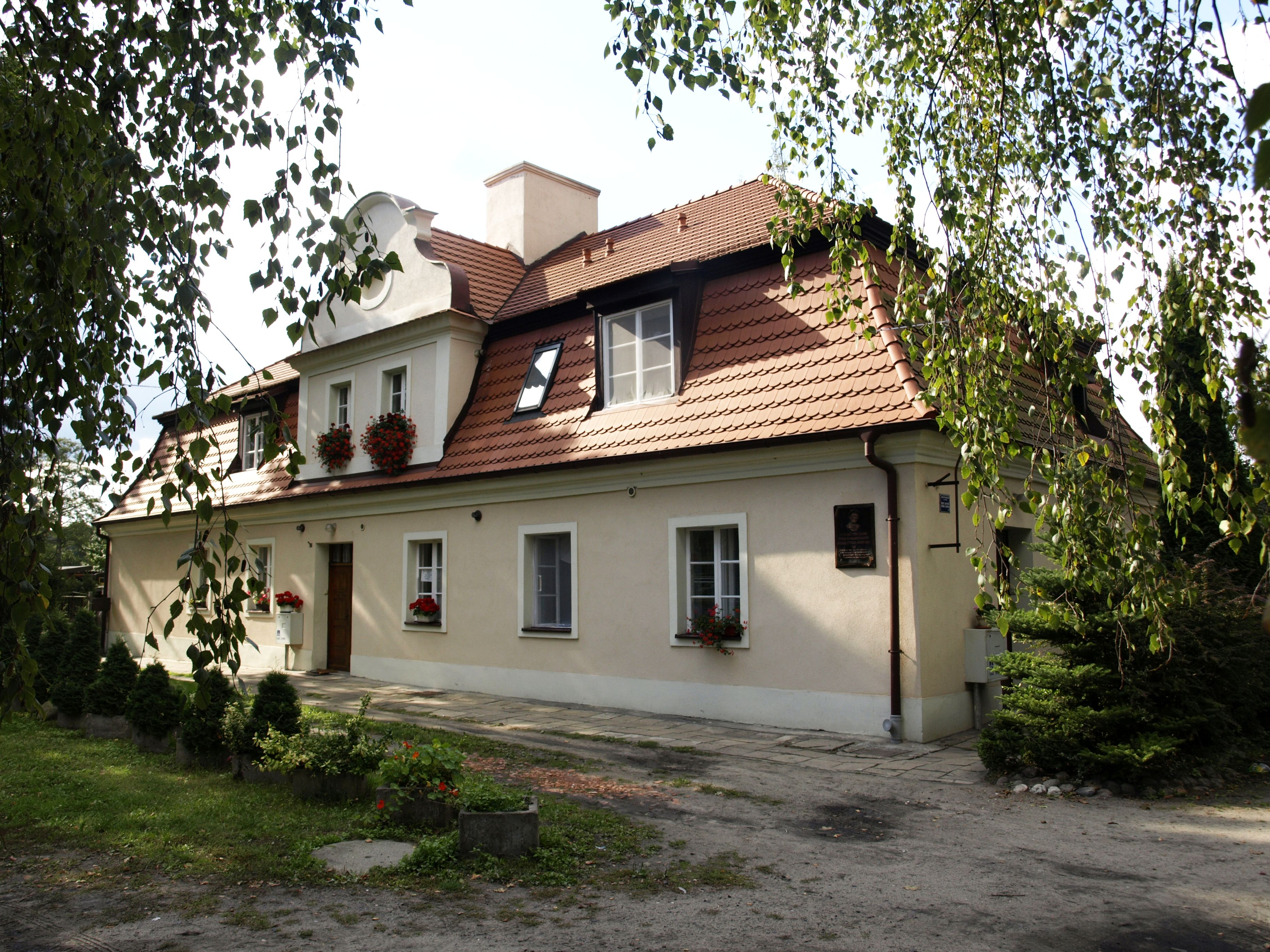 oficyna folwarczna z 2. połowy XVIII w. Kórnik, Kórnik Template:Dawna oficyna folwarczna z ok. poł. XVIII w., ul. Prowent 4